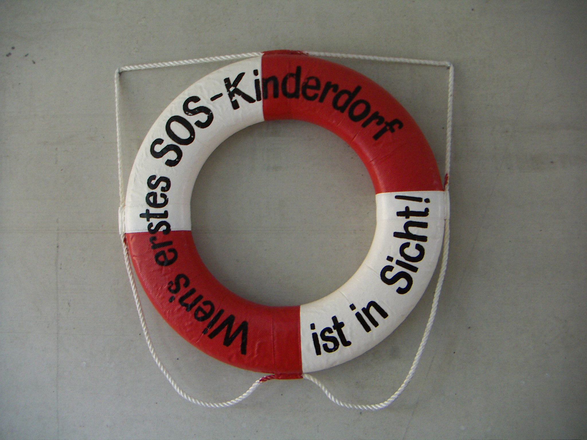 SOS-Kinderdorf, FamilienRAThaus, Wien-Floridsdorf